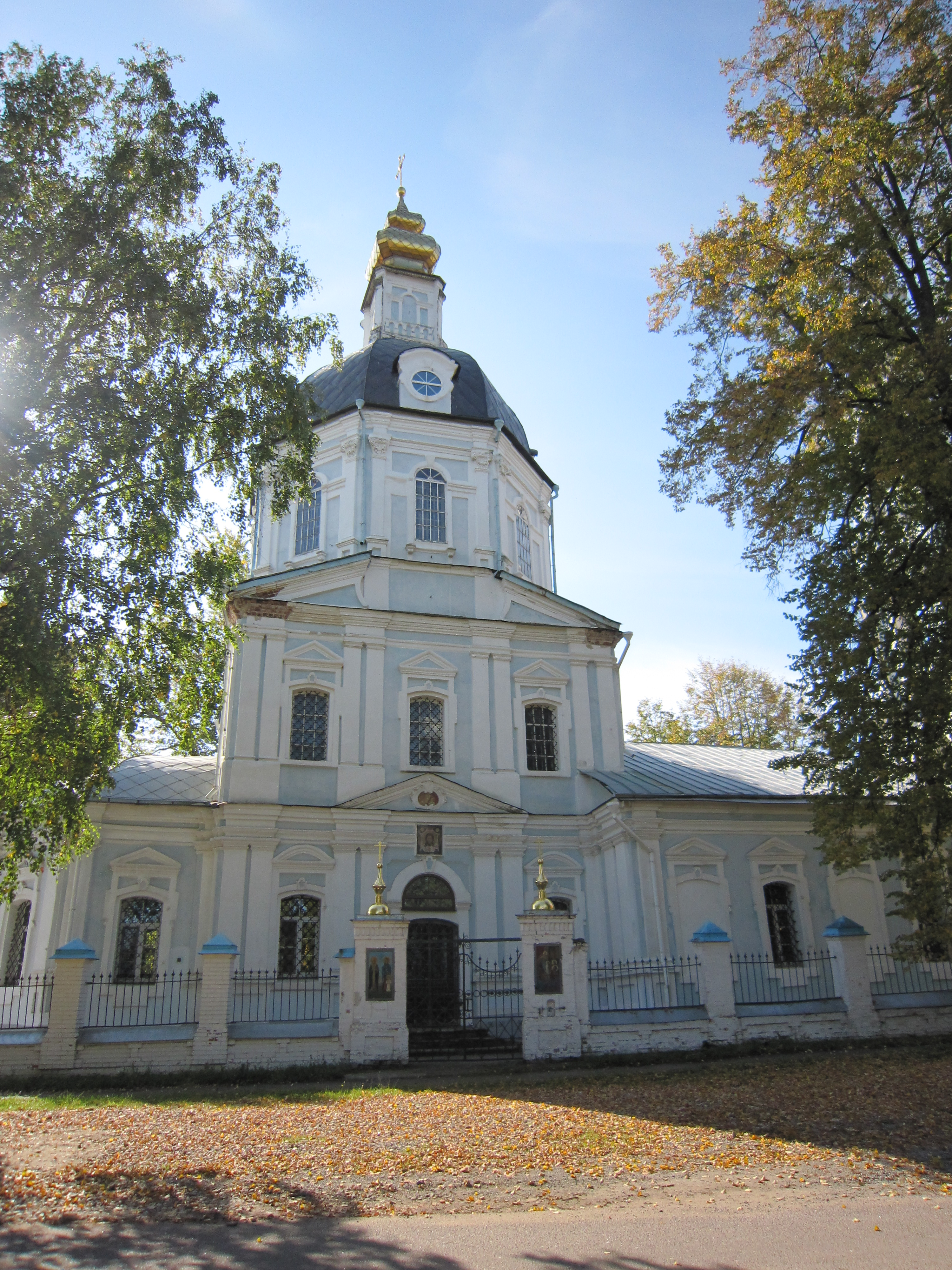 Ансамбль церкви Введения во храм Пресвятой Богородицы (Москва и Московская область, Дмитров, улица Старо-Рогачевская, 47 (Заречье))